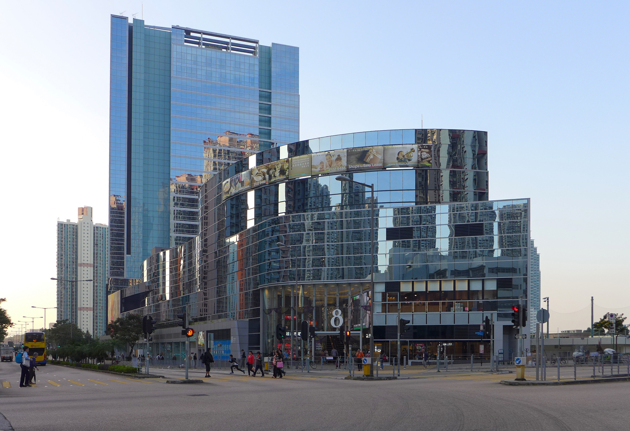 8 Tin Sau Road